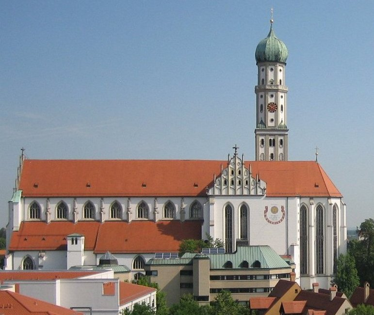 Basilika St. Ulrich und Afra in Augsburg (aus Süden) mit Tagungseinrichtung Haus St. Ulrich (vor dem Kirchenbauwerk)